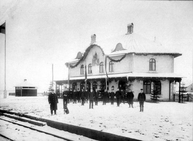 Harlösa station. Kanske vid invigningen år 1906. Fotograf: Okänd.